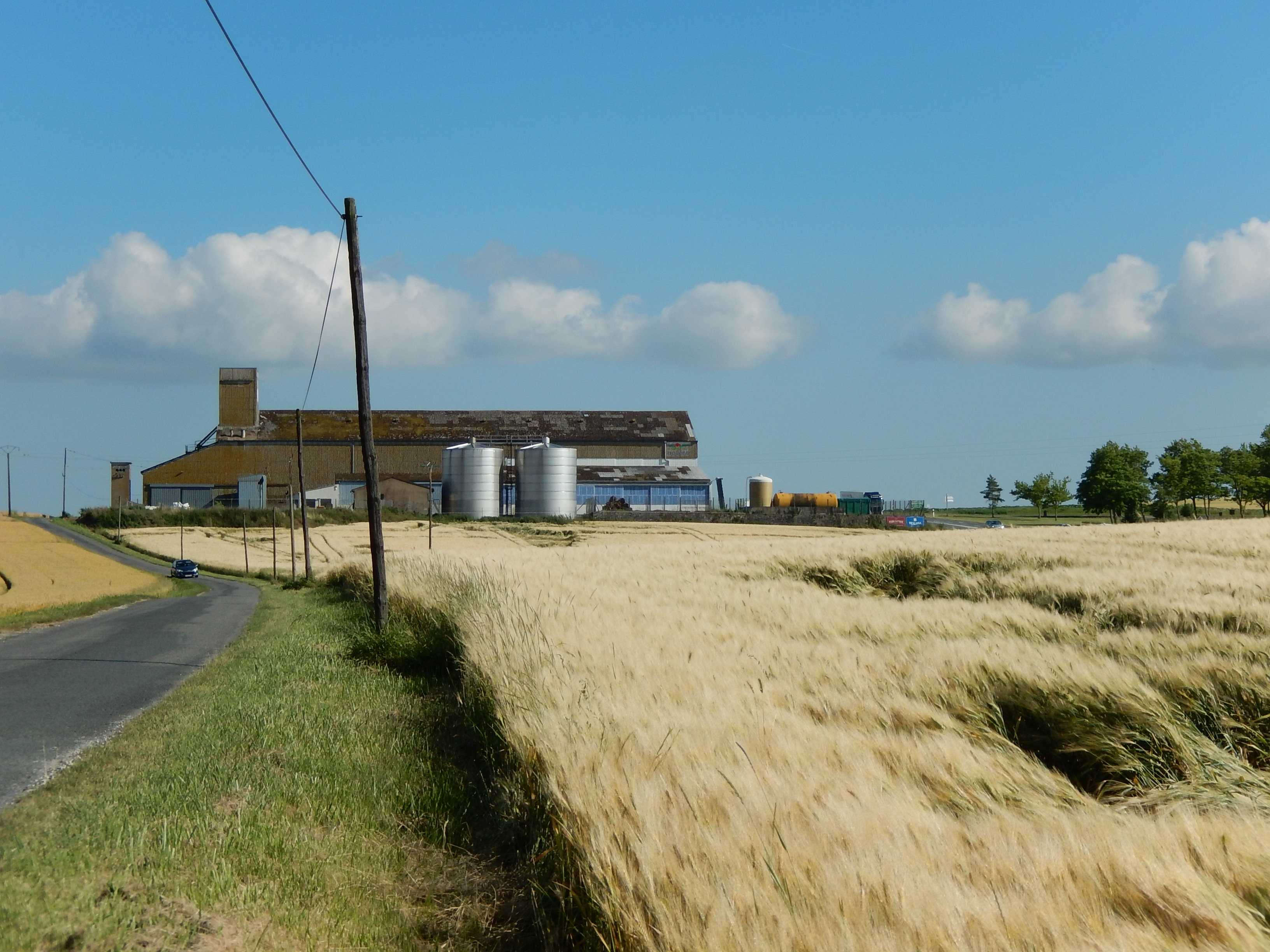 Le silo situé au sud de la Jard (Charente-Maritime, France). On aperçoit à gauche, la « voie romaine » (qui est actuellement une petite route goudronnée), et à droite à l'arrière-plan, la route départementale D137. Entre les deux, un champ, représentatif de la vocation essentiellement agricole de la commune.